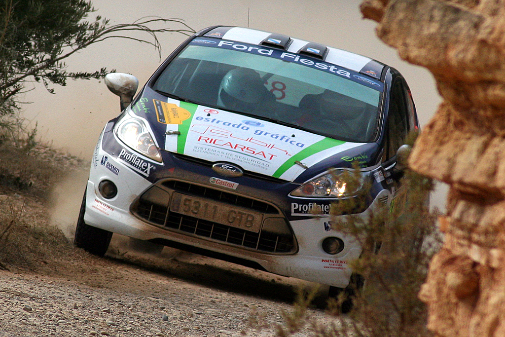 Lodeiro Rally Catalunya 2010